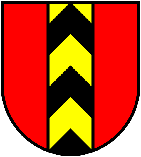 Beschreibung: Wappen des Bezirks Lebern Quelle: selbstgezeichnet Fotograf oder Zeichner: Benutzer:Stw Andere Versionen: SVG auf Anfrage